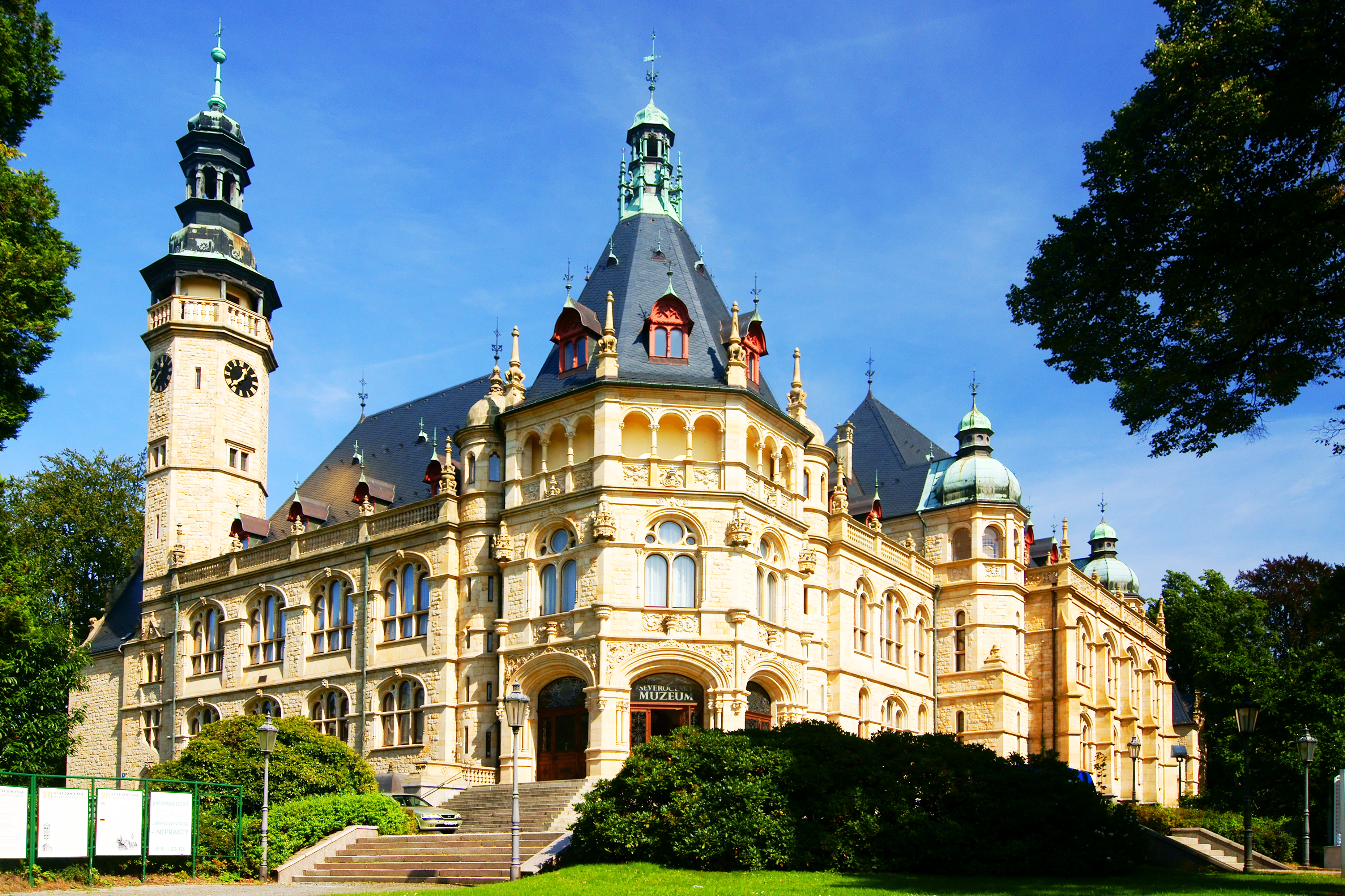 Severočeské muzeum v Liberci.